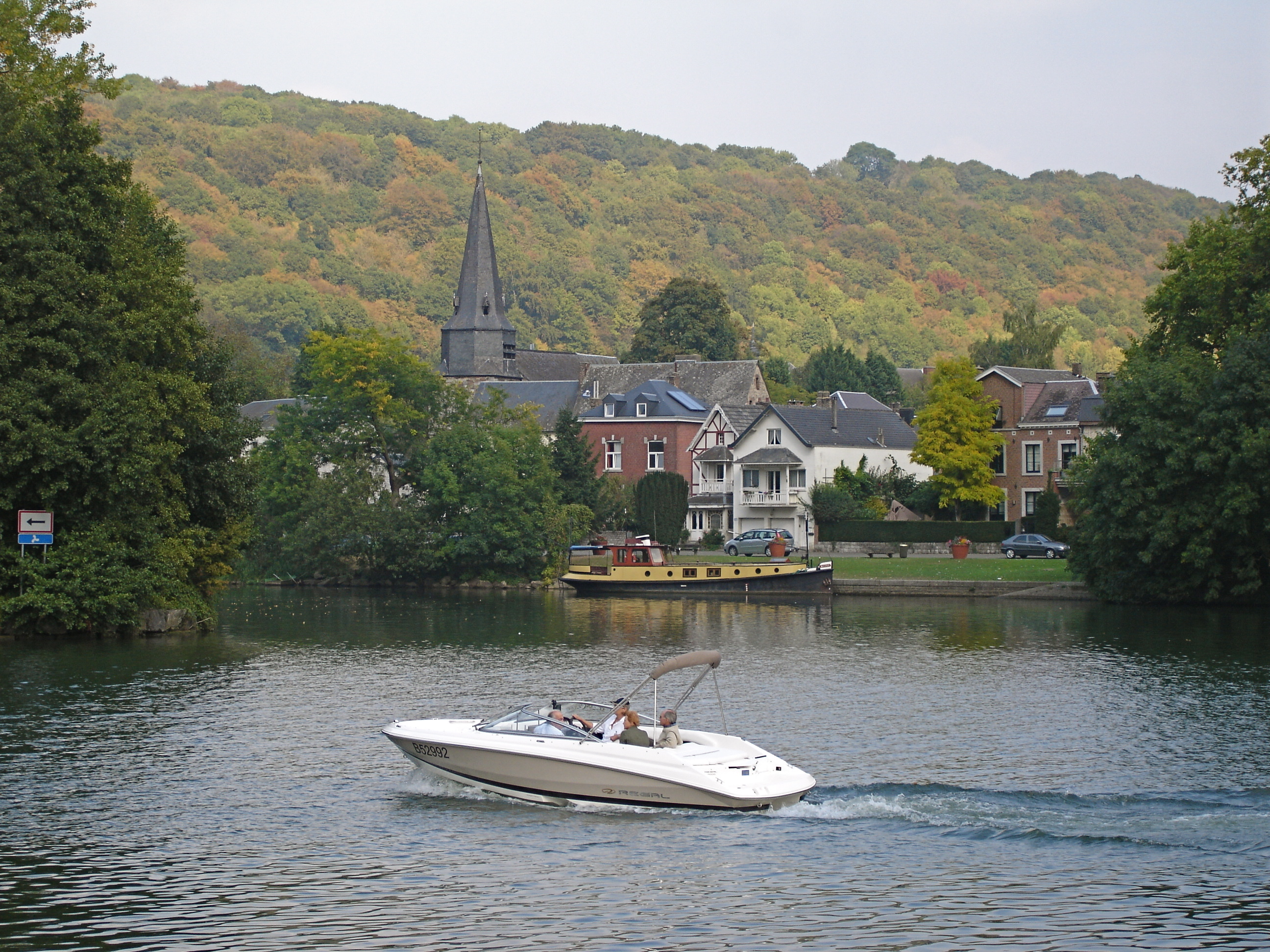 Dave, le village vu de la Promenade de Meuse à Wépion (rive gauche).